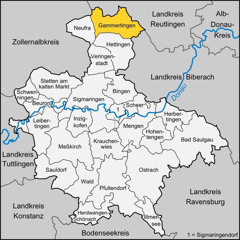 Karte der Stadt Gammertingen im Landkreis Sigmaringen